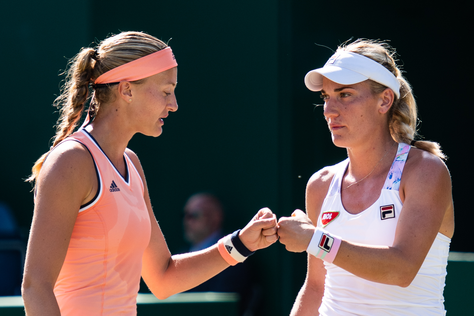 Timea Babos & Kiki Mladenovic